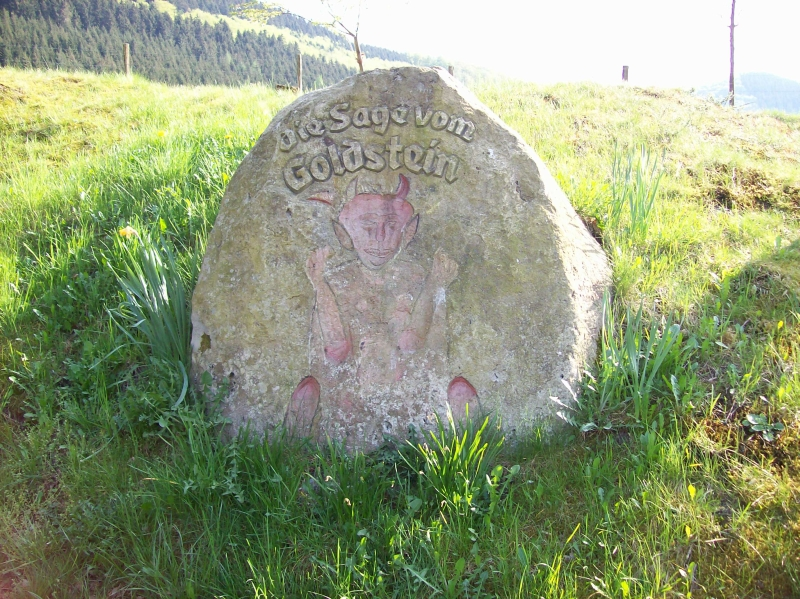 Goldstein in Hundesossen (Schmallenberg) , Germany.